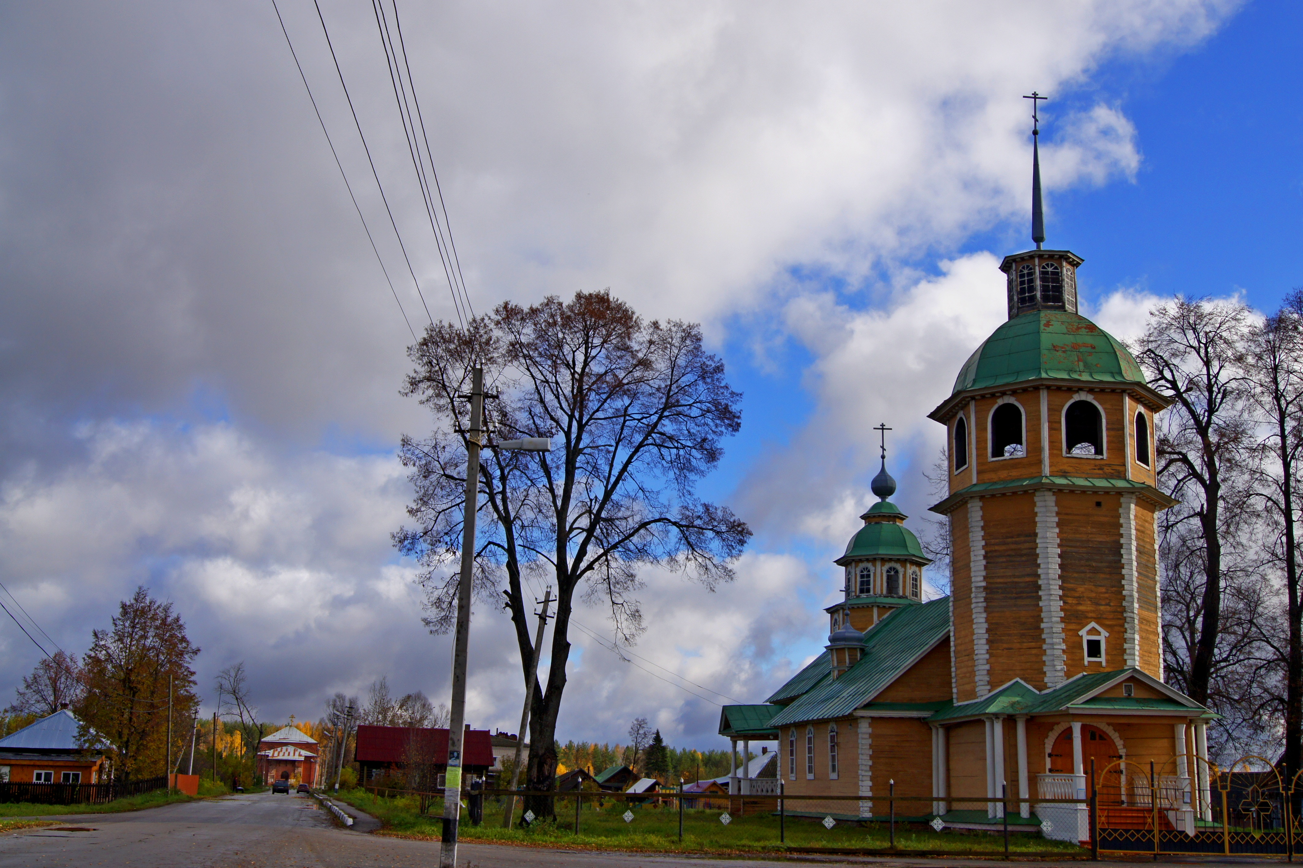 Церковь Владимирской иконы Божией Матери: Владимирское, Воскресенский район, Нижегородская область